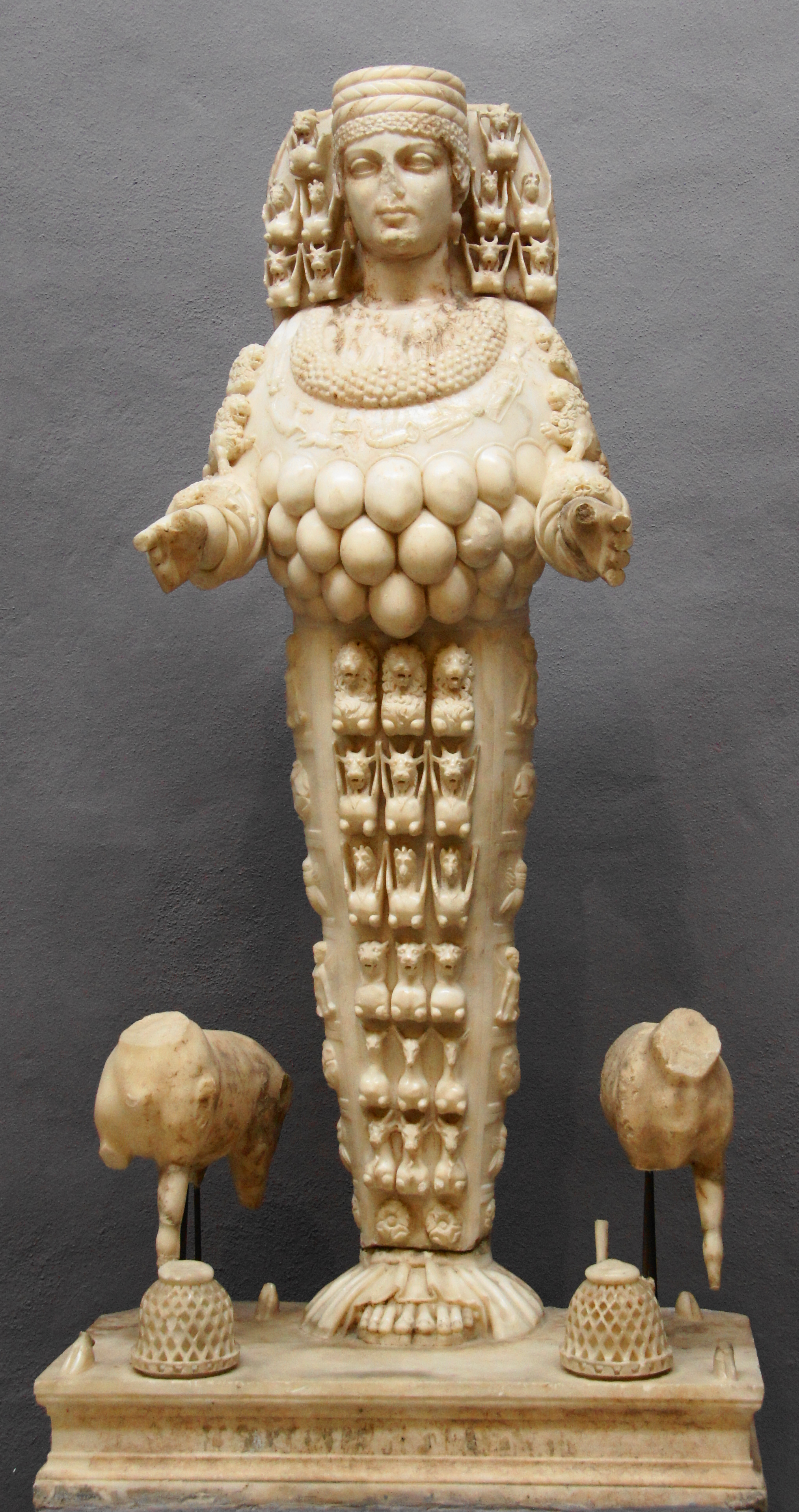 Artemis